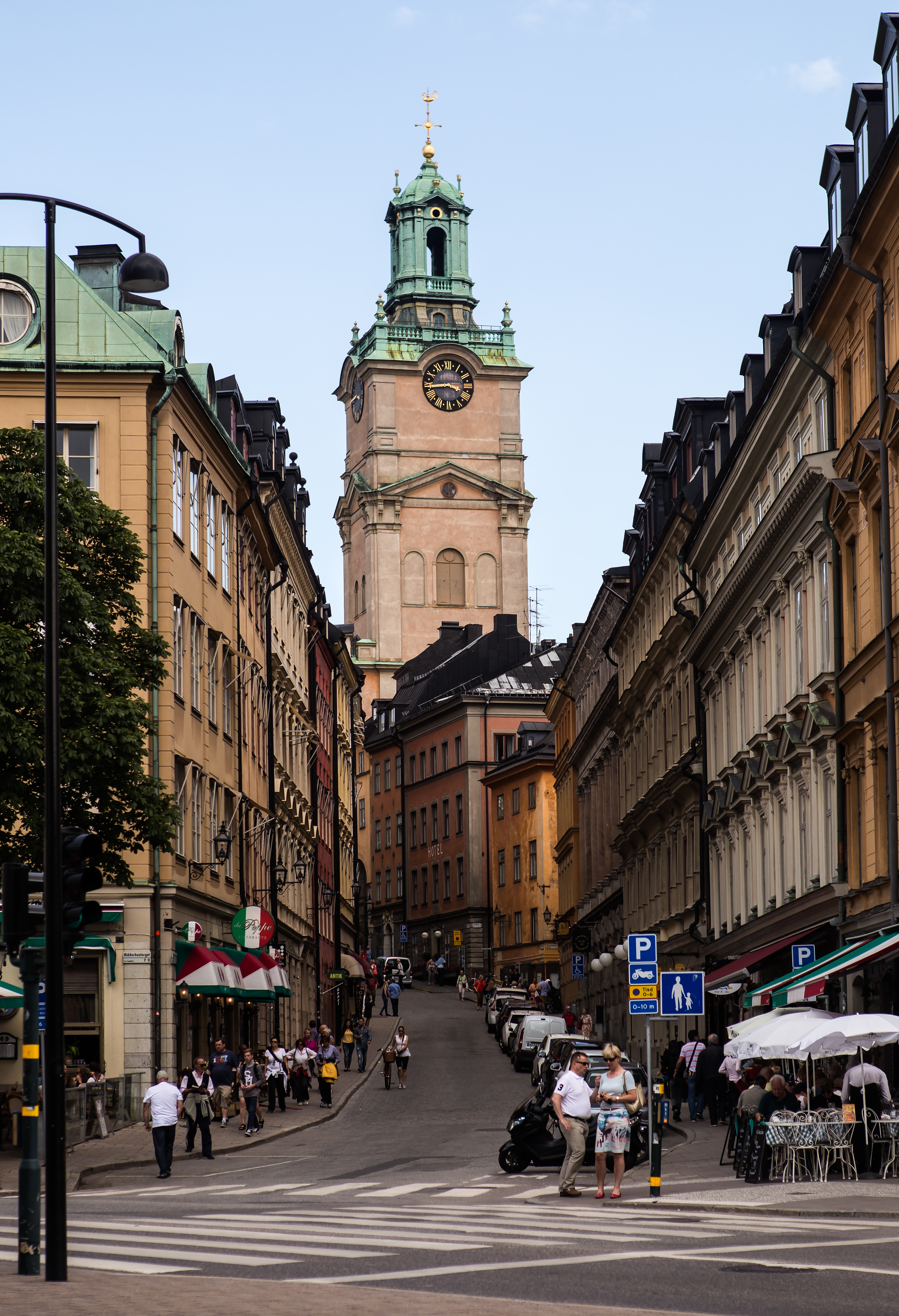 Storkyrkobrinken